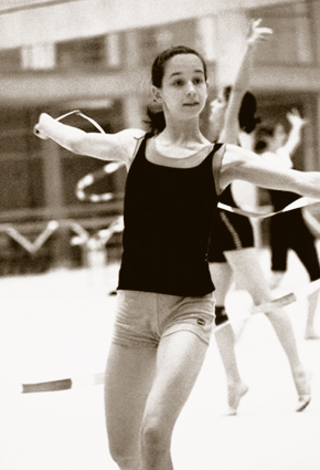 Igone Arribas, como componente del conjunto nacional de gimnasia rítmica, durante un entrenamiento en el CAR de Madrid en el año 2000.